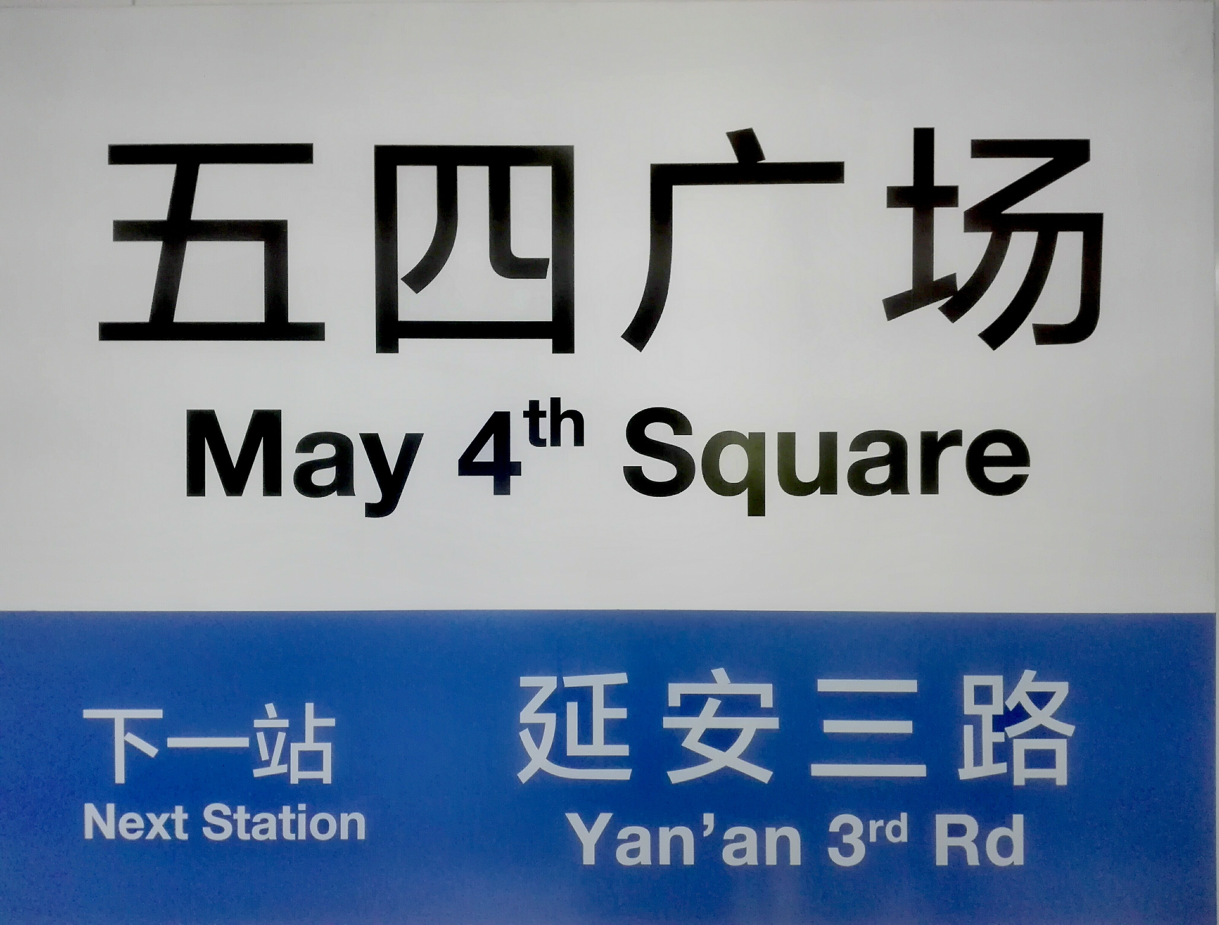 五四广场站站牌